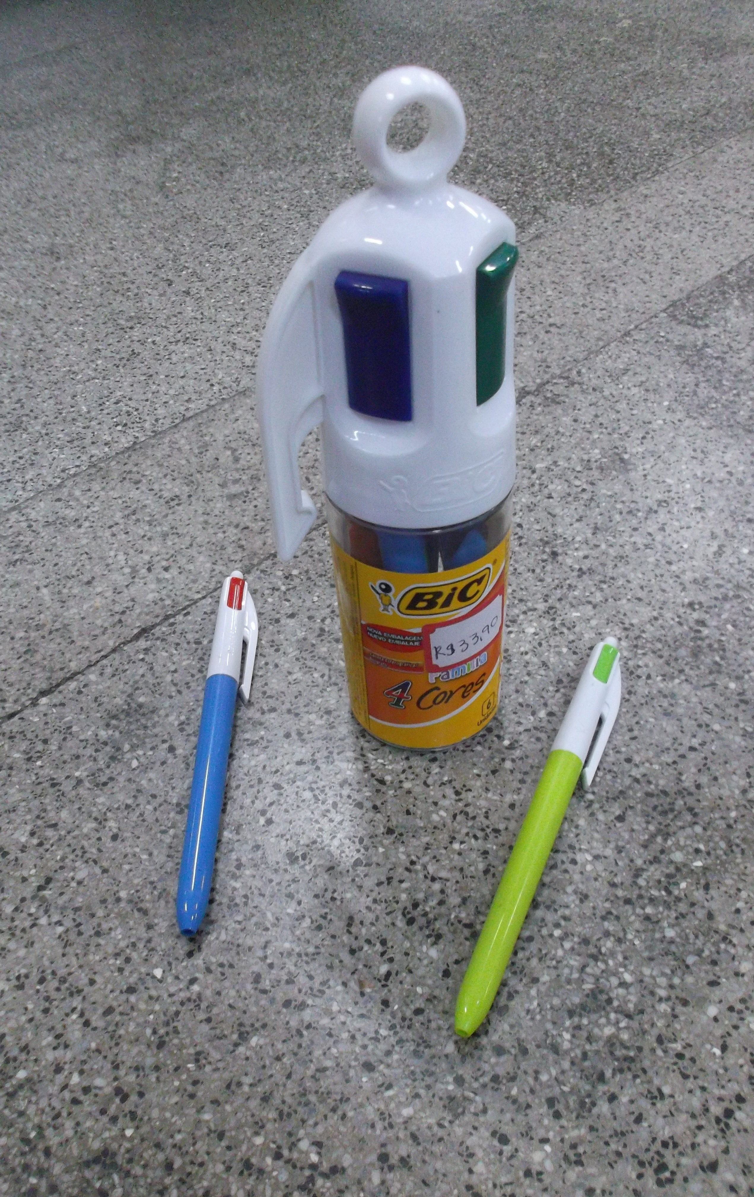 Canetas BIC ao lado de um expositor.